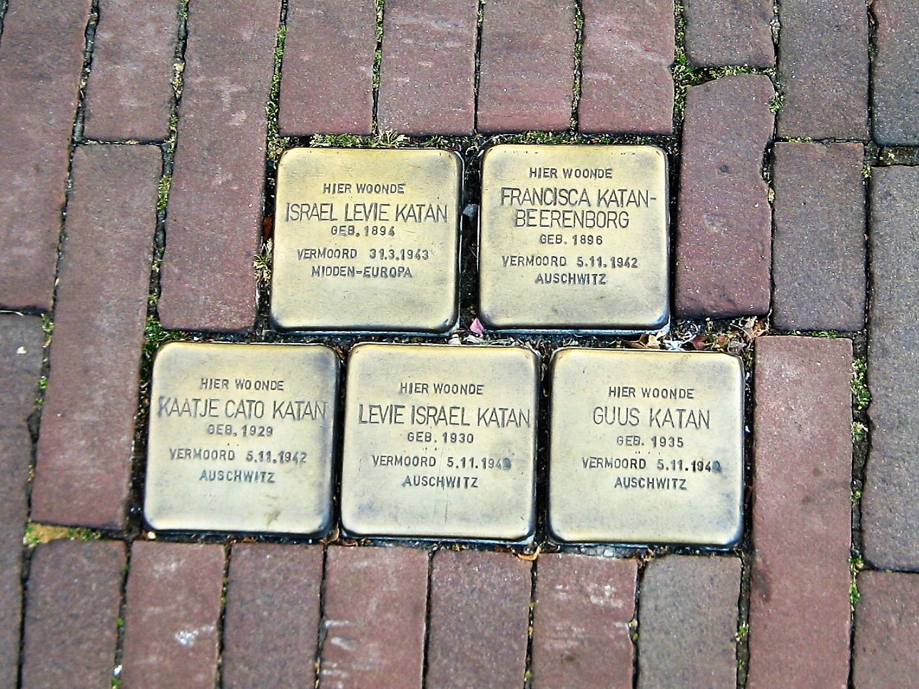 Stolpersteine Voorstraat 42, Brielle